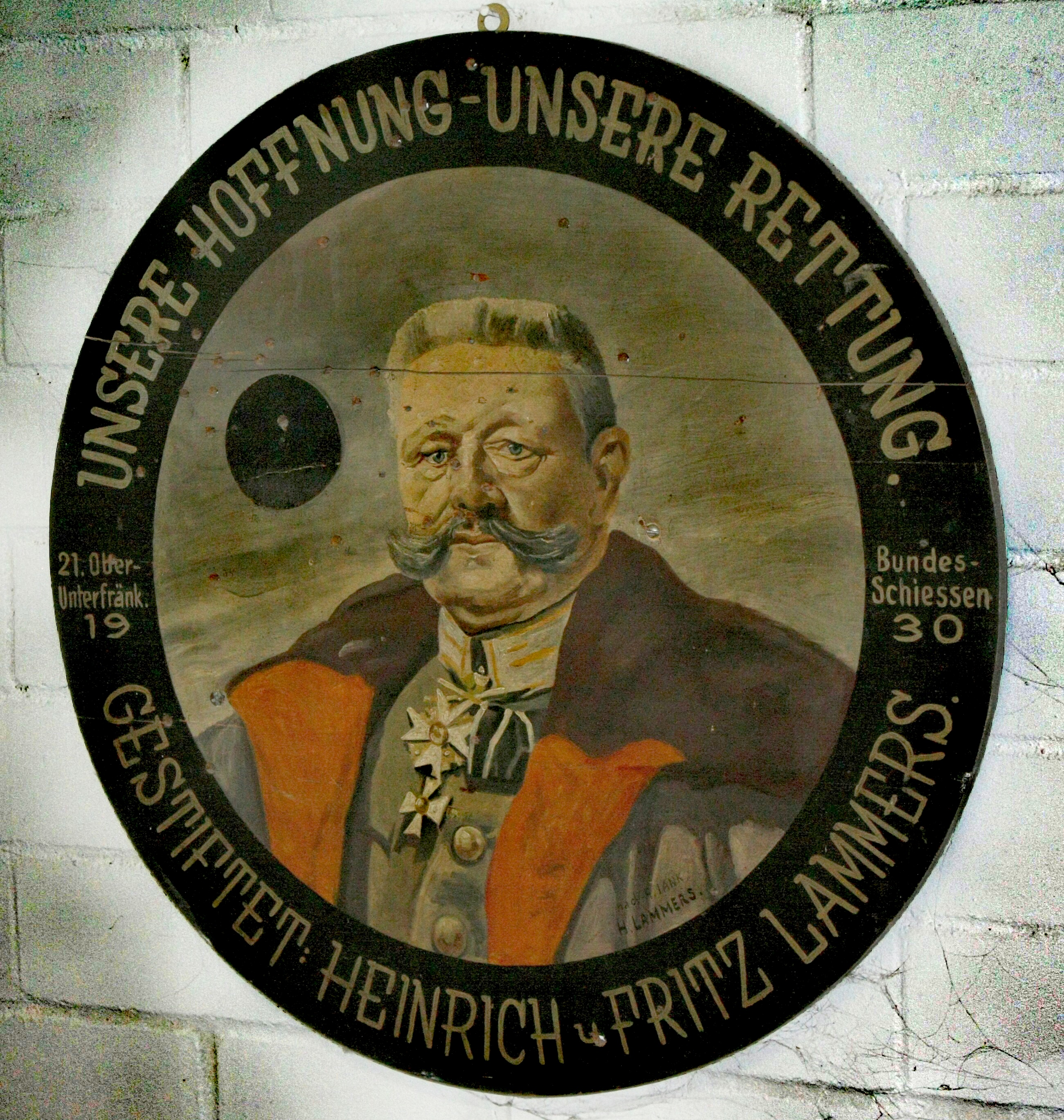 Schützenscheibe mit Reichspräsident v.Hindenburg 1930